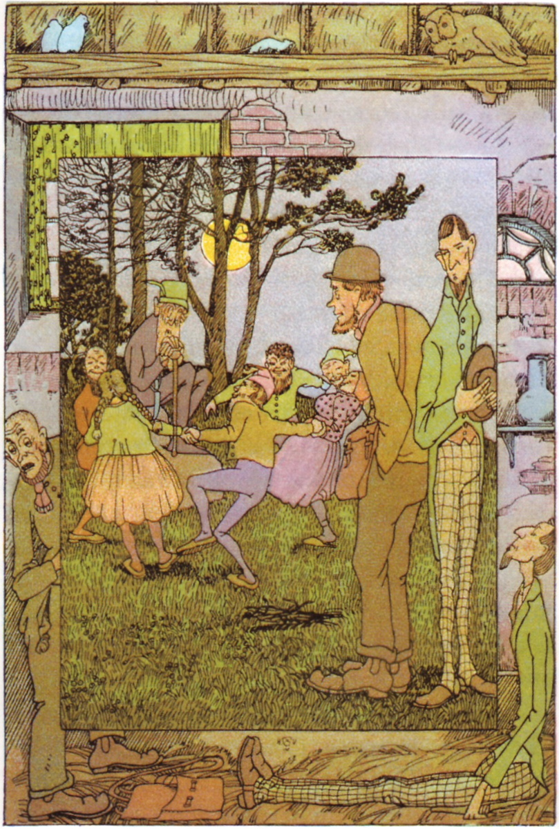 Illustration des Grimm'schen Märchens „Die Geschenke des kleinen Volkes“ (KHM 182) von Heinrich Vogeler